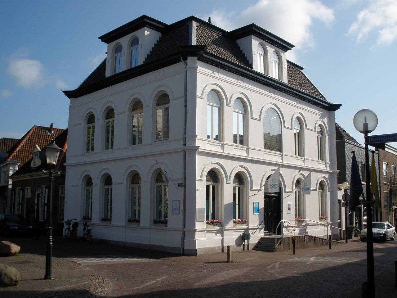 Het Zoutmuseum in de Nederlandse plaats Delden was vroeger het stadhuis van die plaats en sinds 1811 gemeentehuis van Stad Delden. Het pand werd grondig verbouwd in 1873 en in oostelijke richting bijna verdubbeld begin twintigste eeuw. Het pand is een rijksmonument.